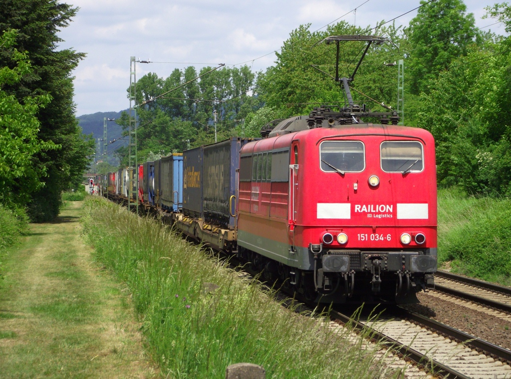 151 034 mit Güterzug bei Unkel Nord